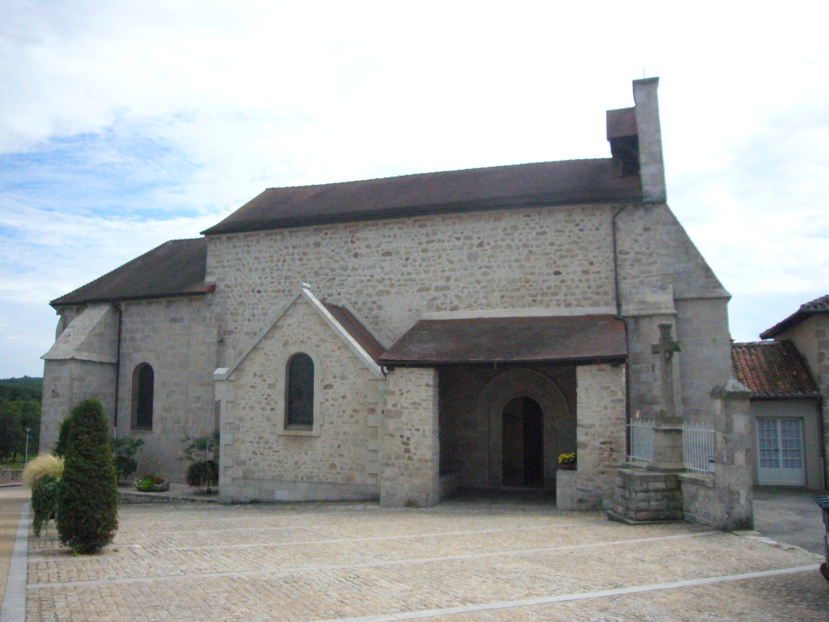 L'église de Feytiat (Haute-Vienne)